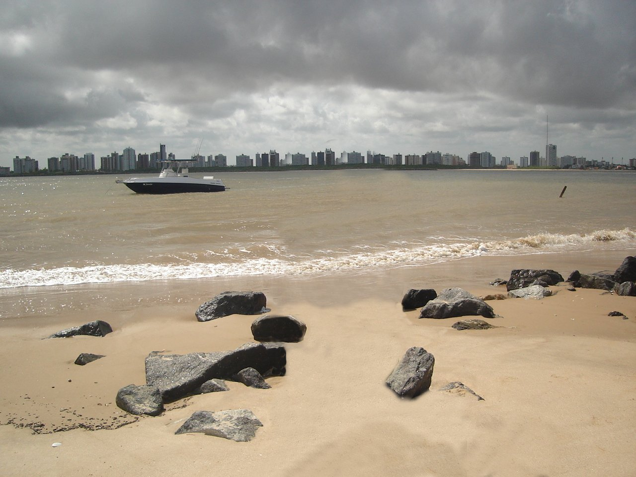 Aracaju vista a partir da Barra dos Coqueiros, Sergipe, Brasil.